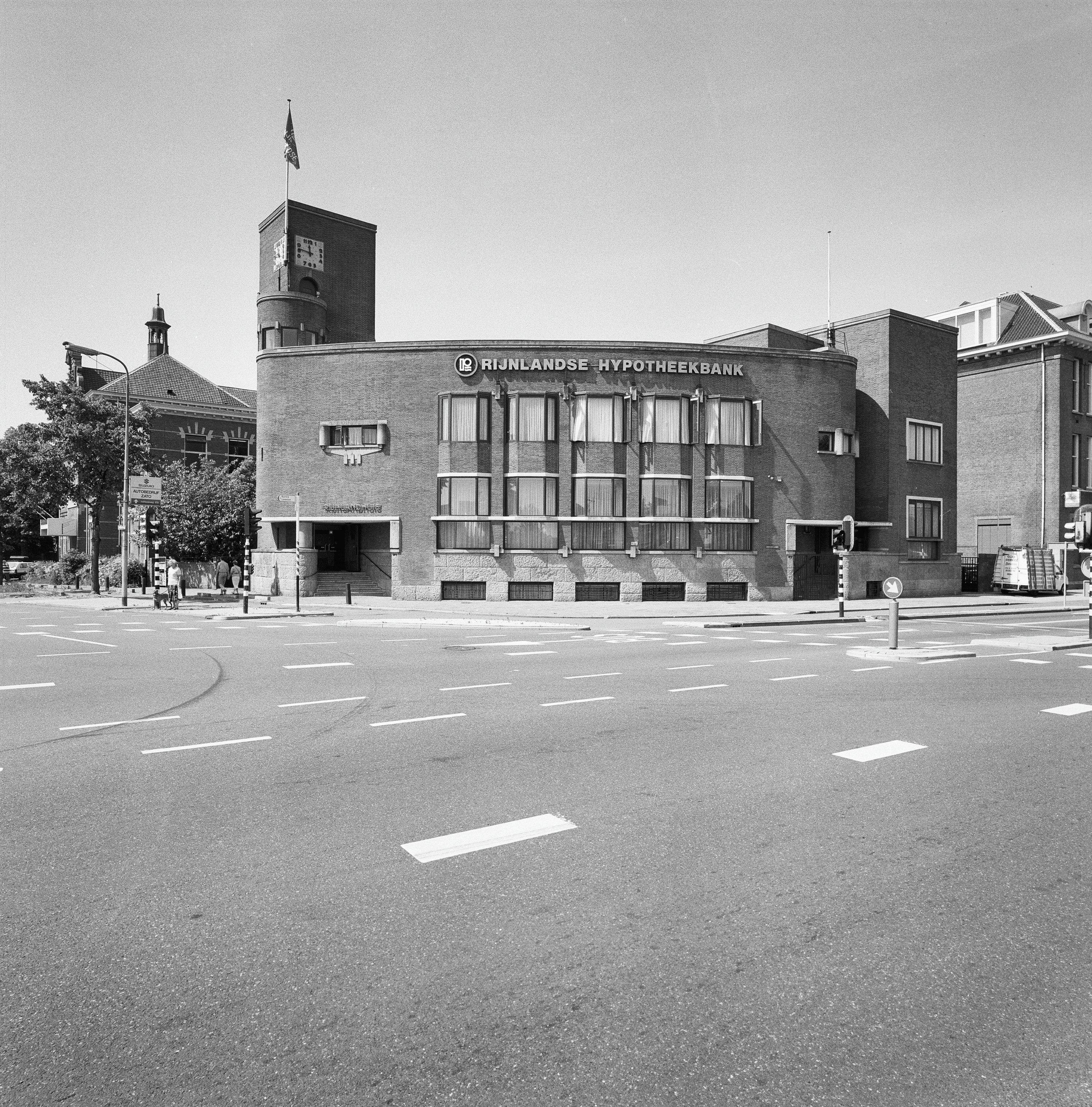 Rijnlandhuis: Exterieur OVERZICHT VOORGEVEL